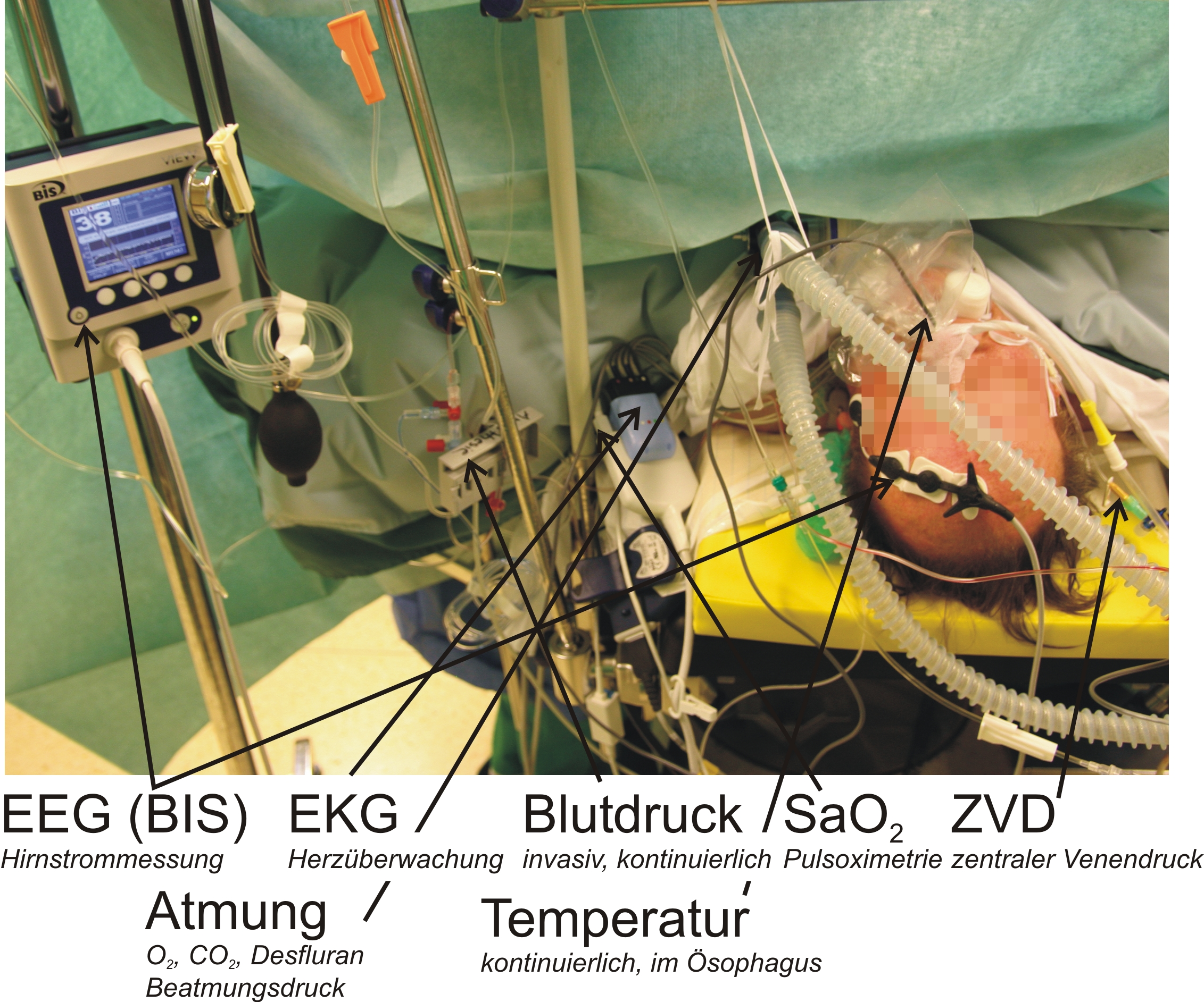 Monitoring (Überwachung) während einer Narkose